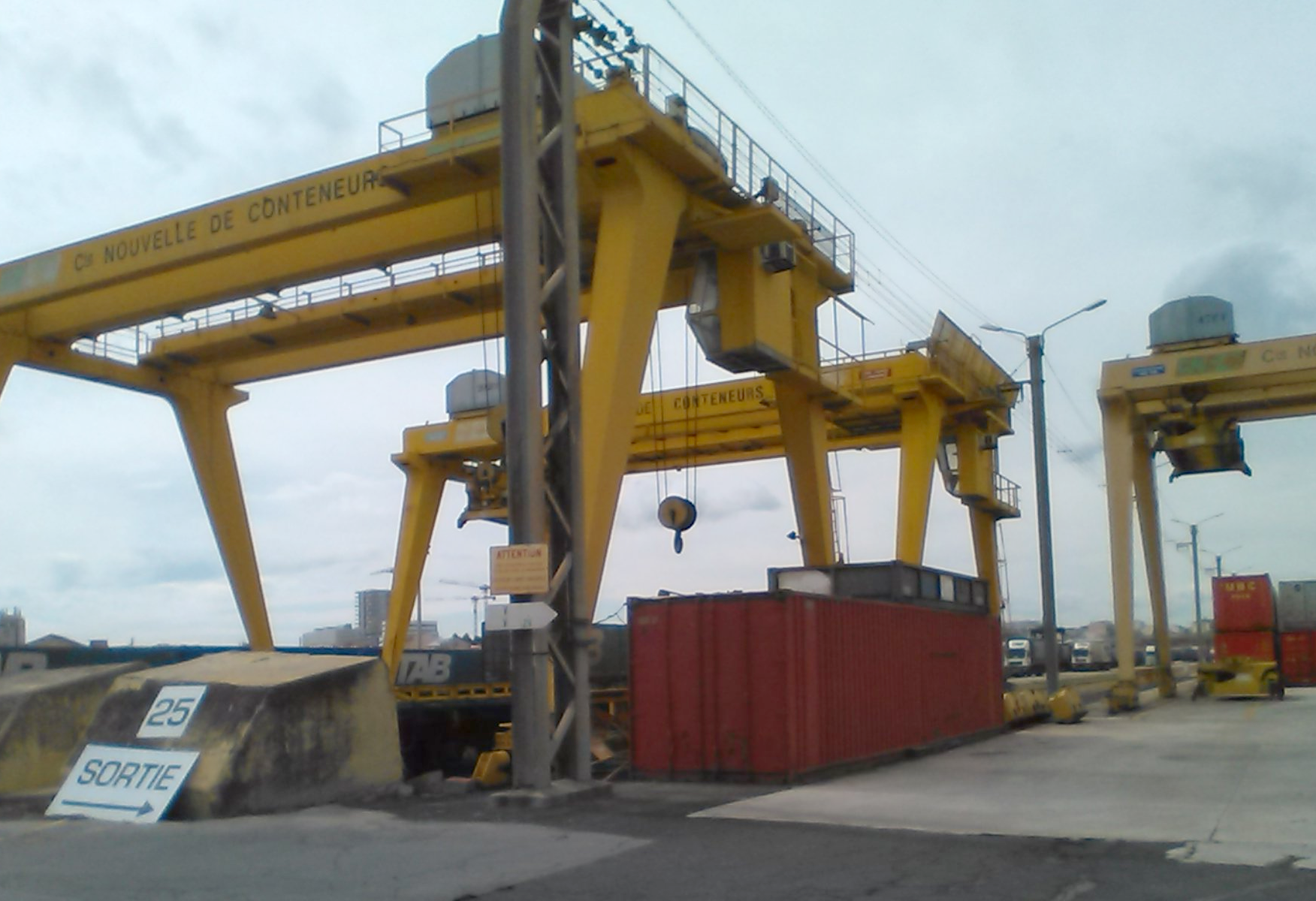 Portiques pour conteneurs de marchandises.